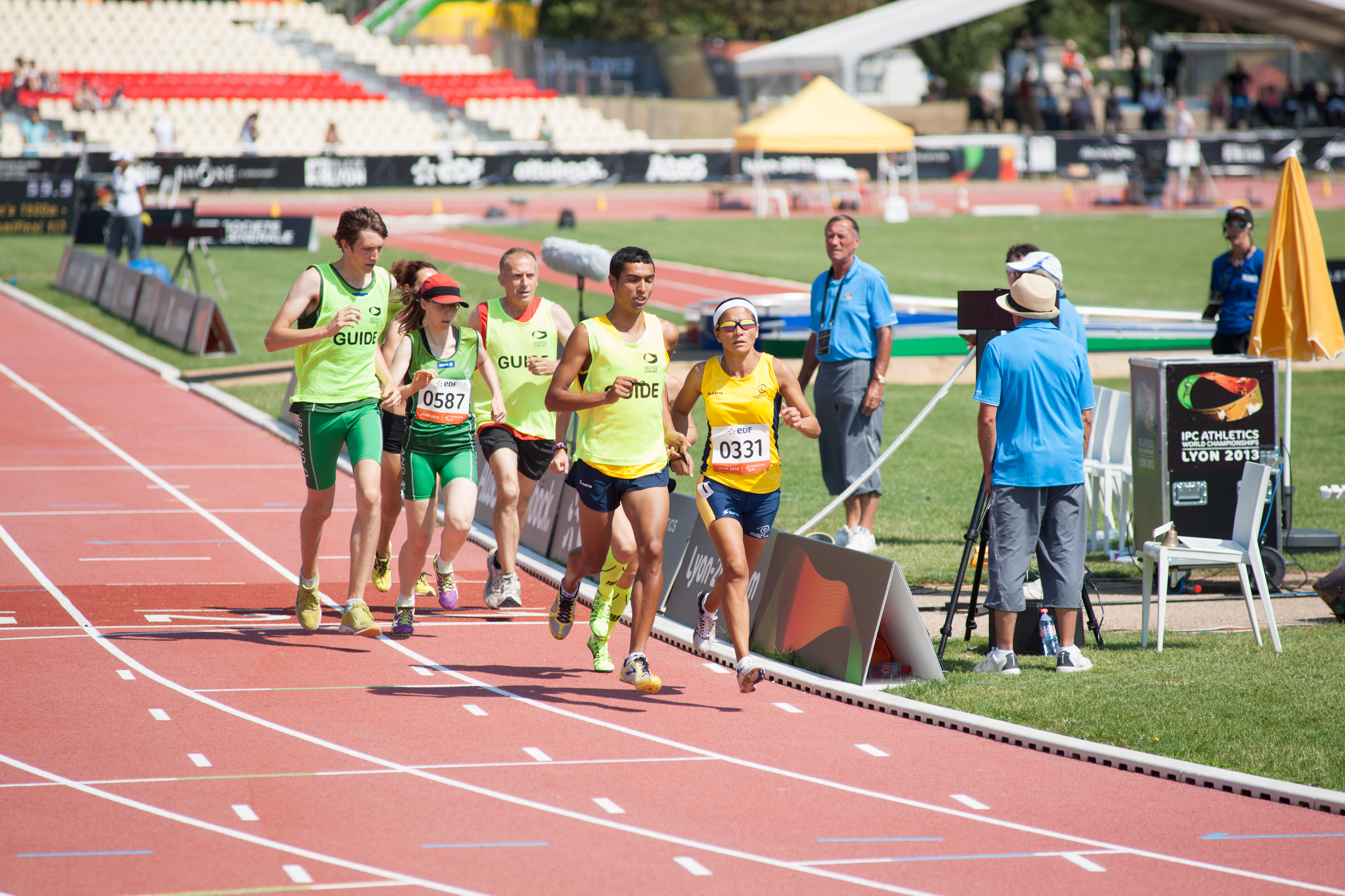 2013 IPC Athletics World Championships. Columbia's Maritza Arango Buitrago (0331) leads Ireland's Amanda Crotty (0587) in the semi-final of the T12 1500m.